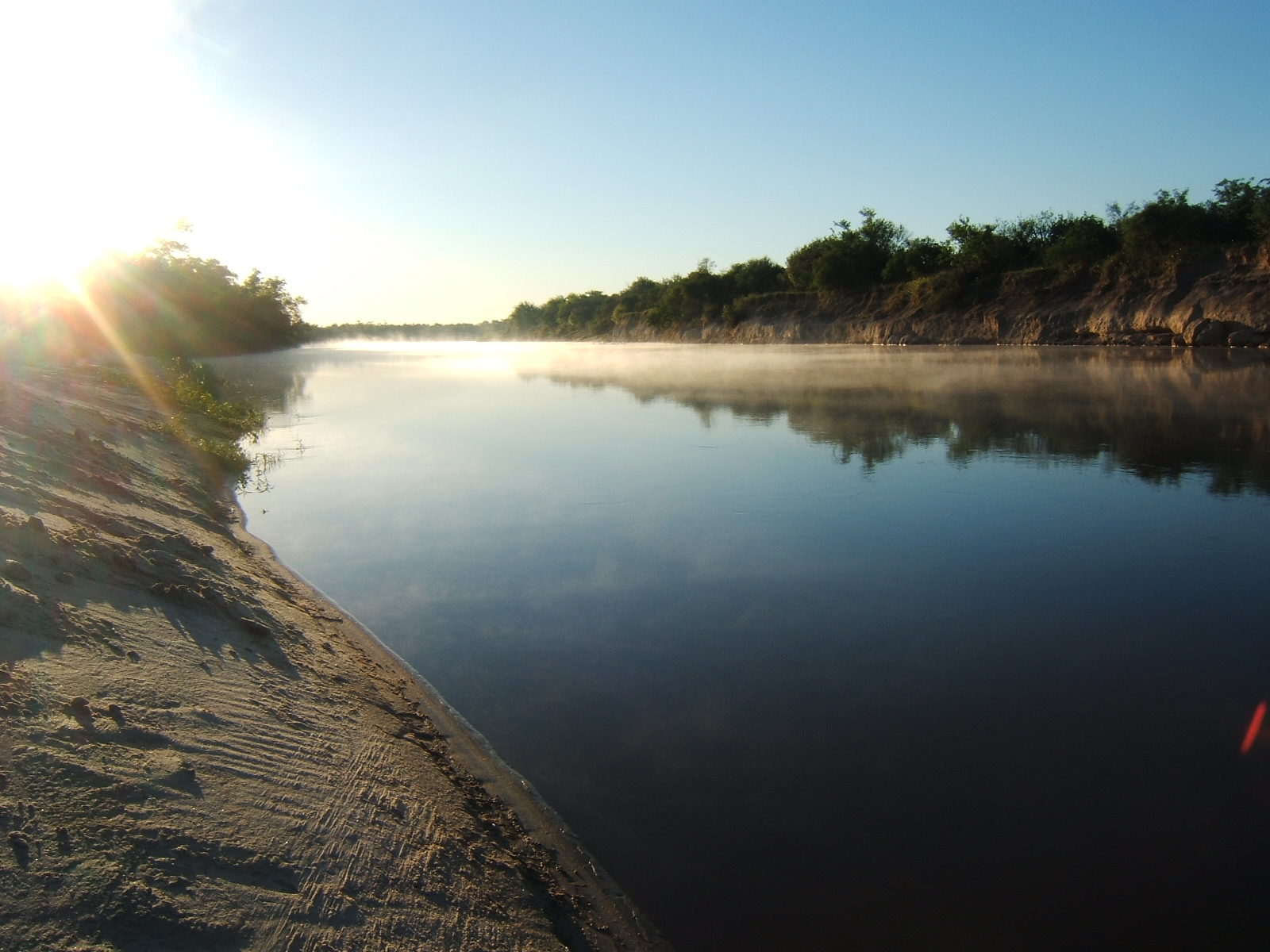 Rio Gualeguay - ER - Argentina